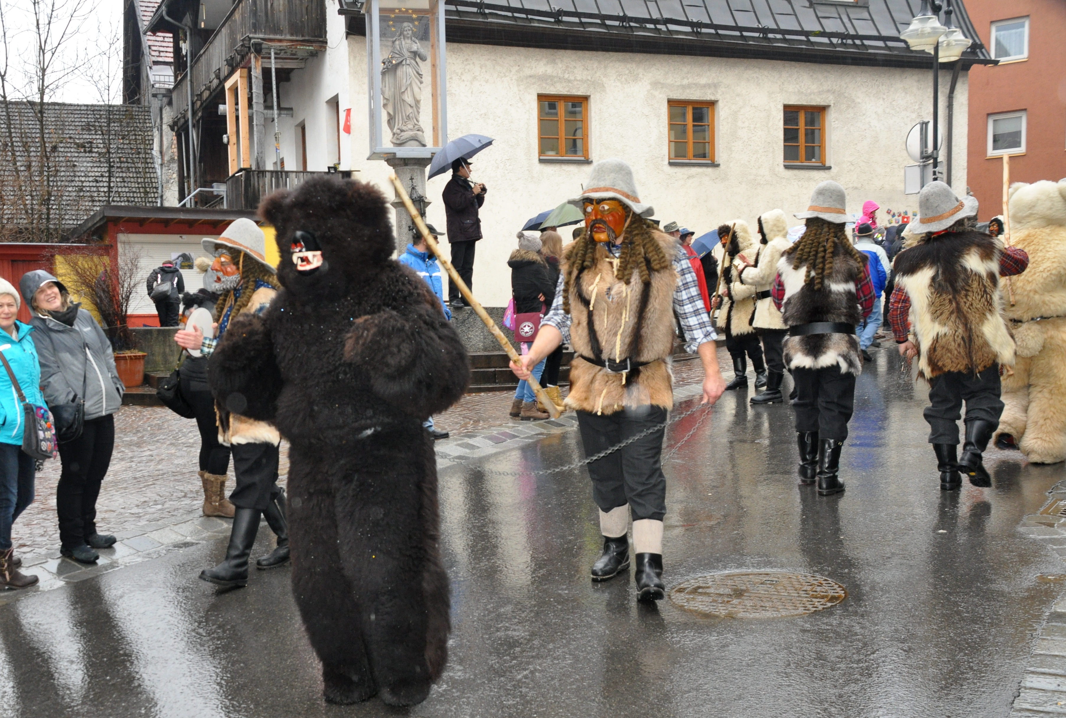 Imst (Tirol), Imster Schemenlaufen 2016, Aufzug, Bärenbande